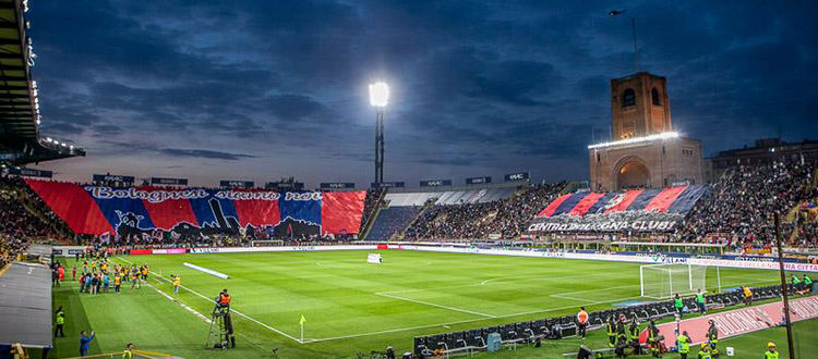 Coreografia Bologna - Milan 2016